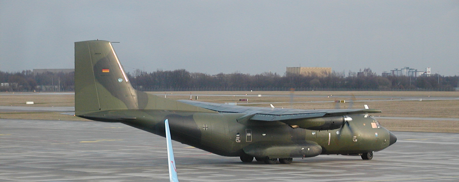 Eine Transall in Hannover von der Seite